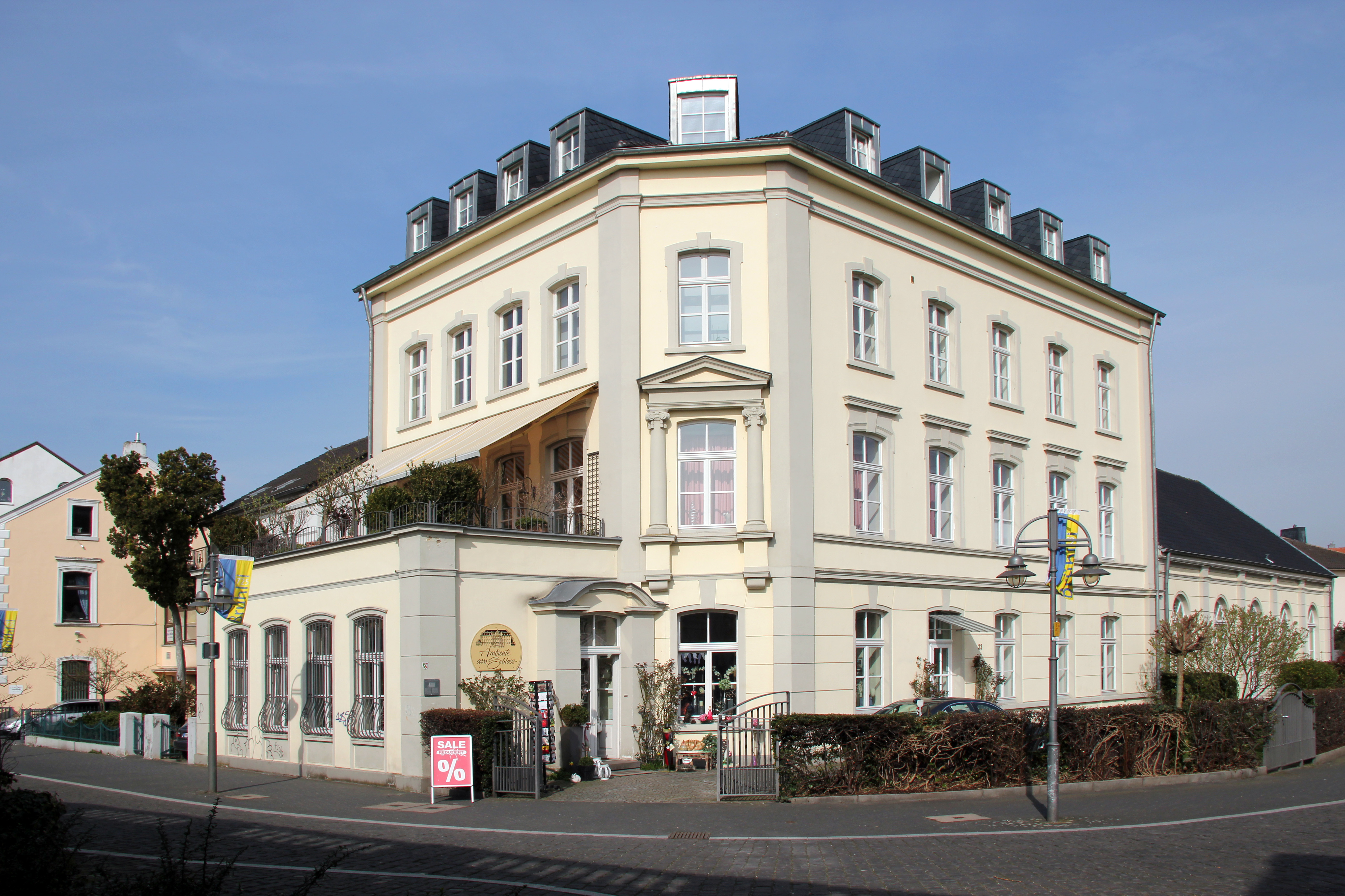 Brühl Schlossstraße 23, ehemaliges Hotel „Deutscher Kaiser“